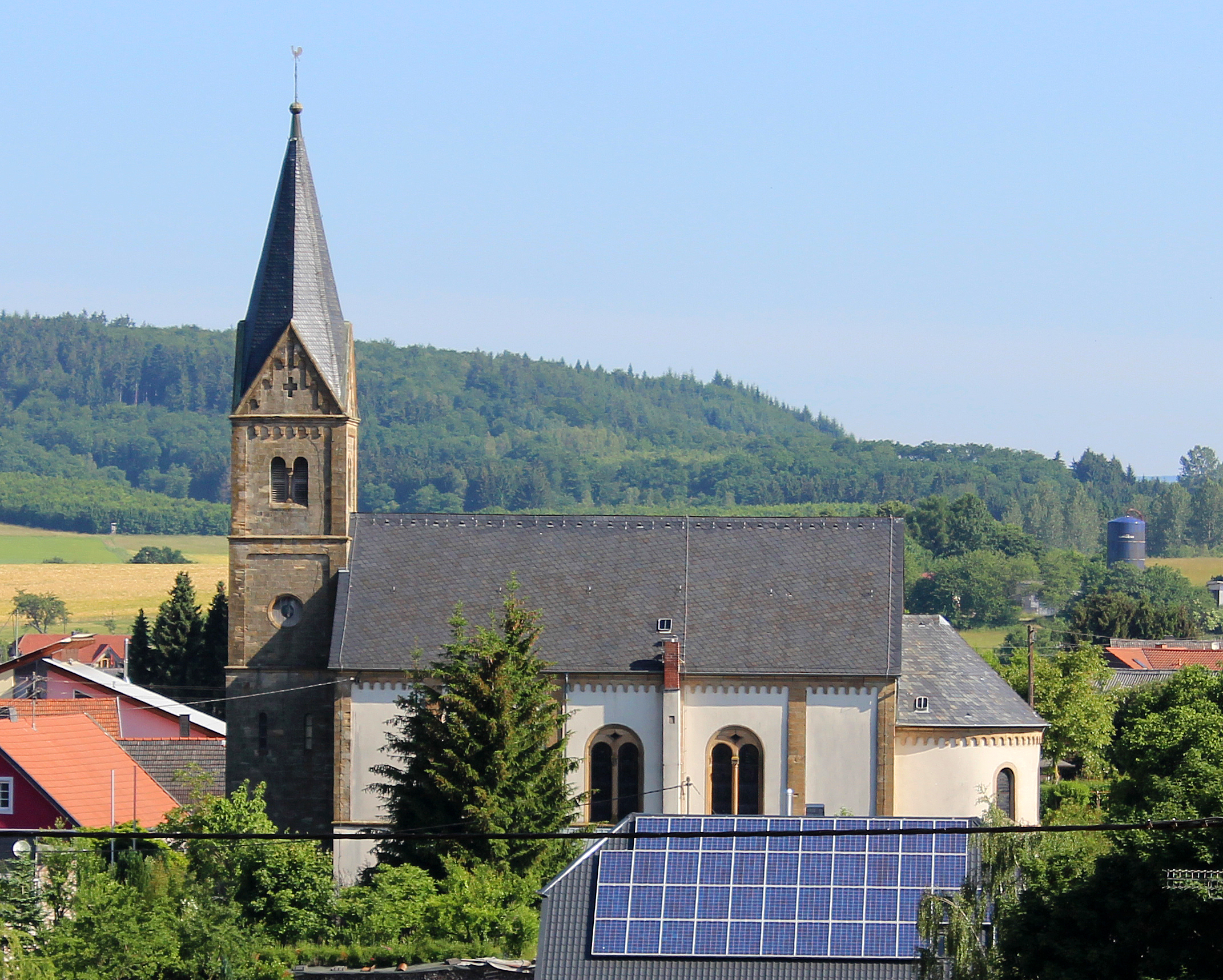 Blick zur katholischen Kirche St. Laurentius in Wolfersweiler, Gemeinde Nohfelden, Landkreis St. Wendel, Saarland